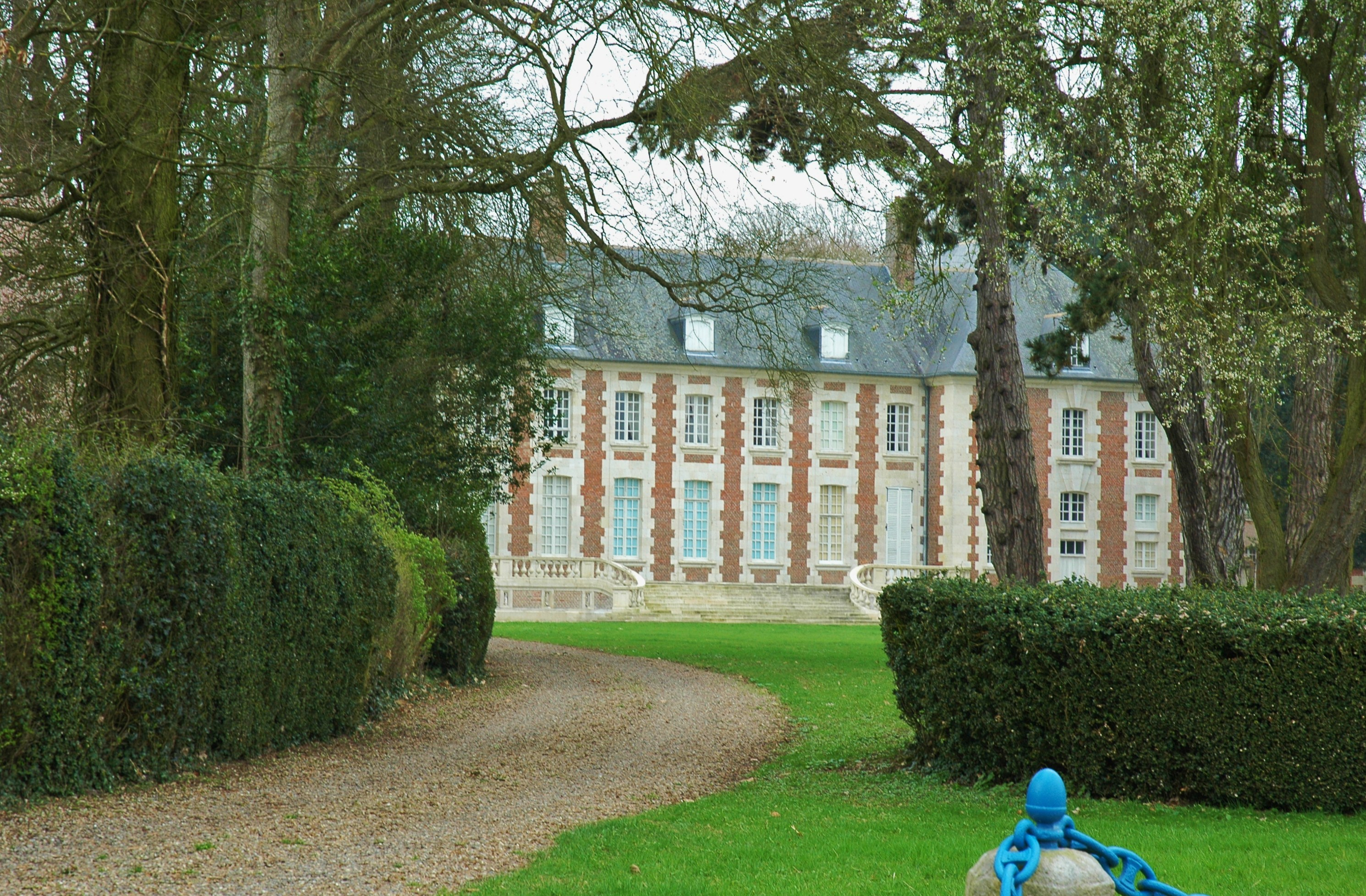 Bovelles (Somme, France). Le château.